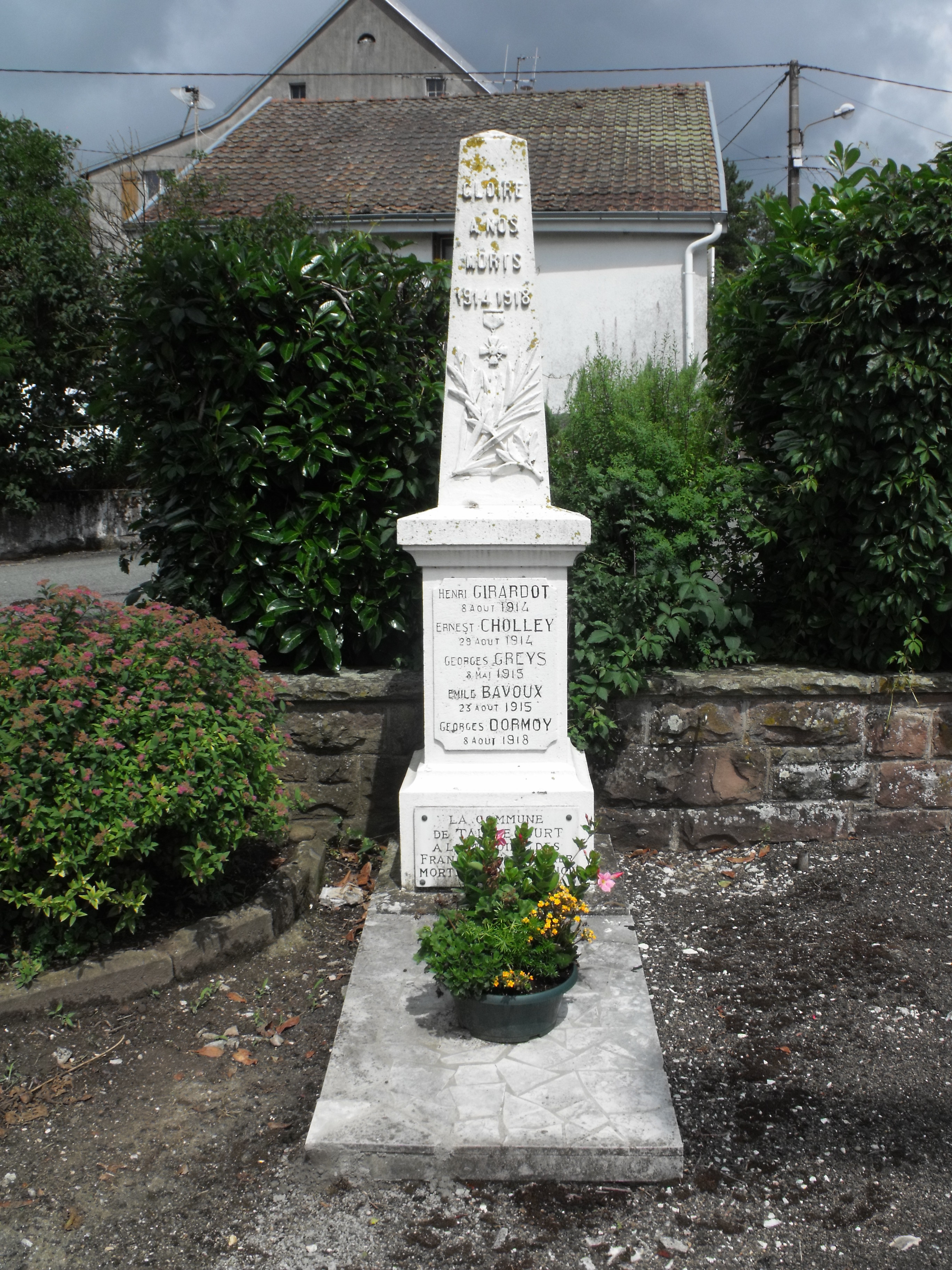 Monument aux morts de Taillecourt, Doubs, France